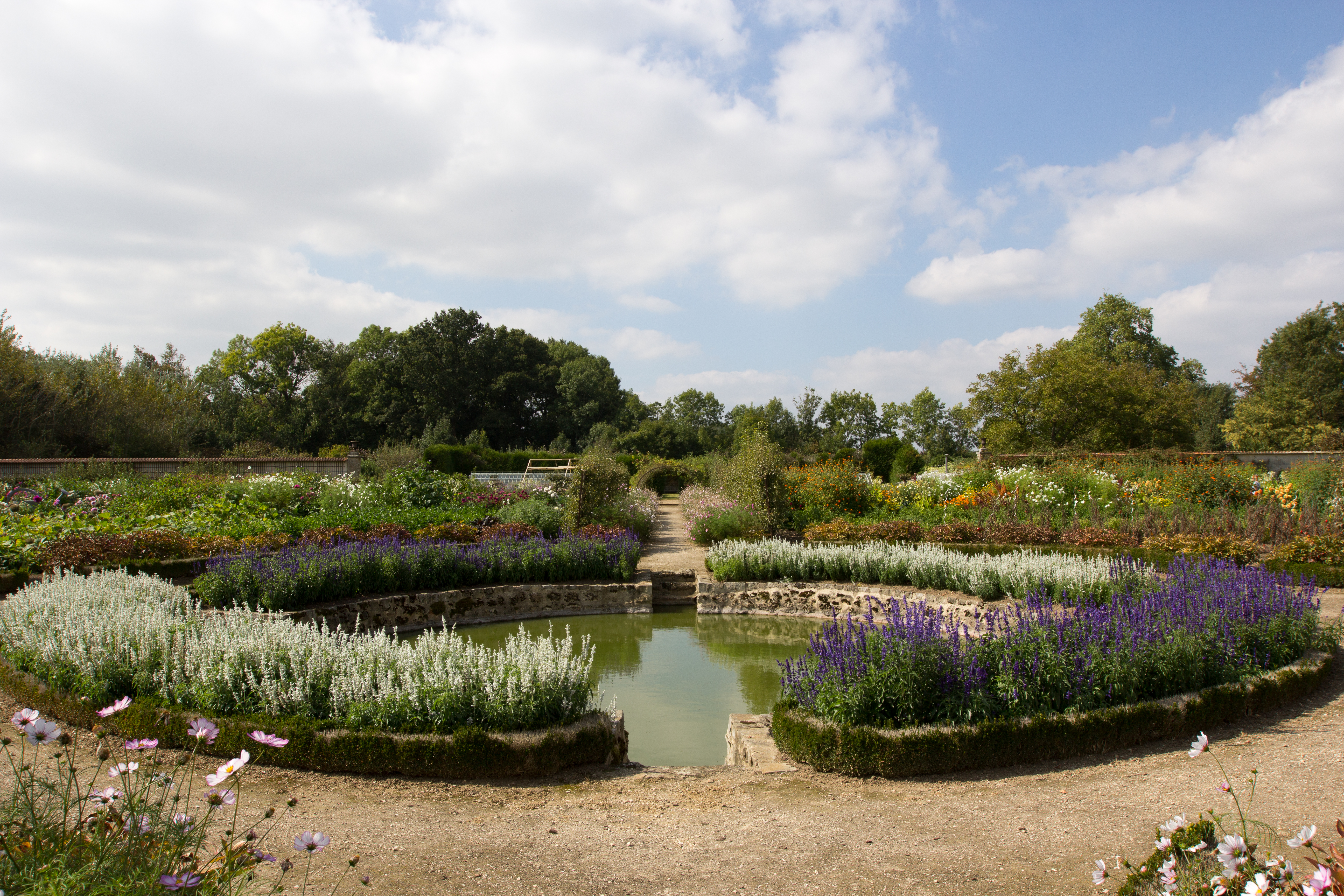 Le potager fleuri à la française du château de Beauregard / Saint-Jean-de-Beauregard / Essonne / France